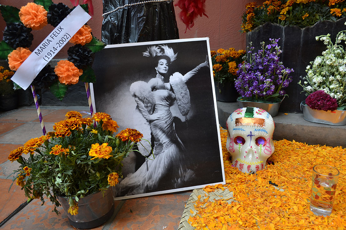 Ofrenda a María Félix en Avenida la Paz, San ángel